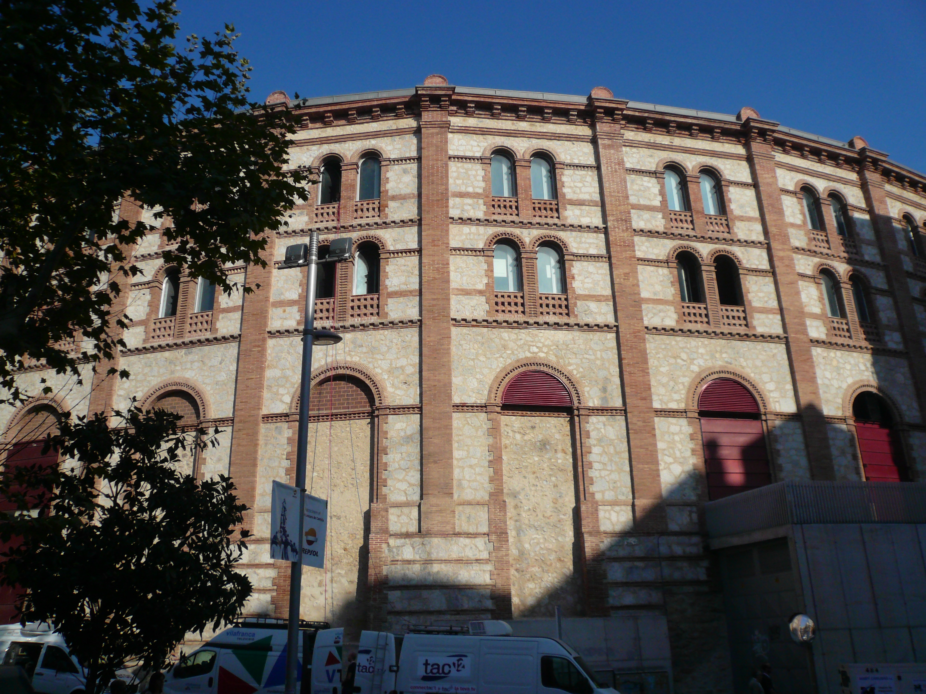 Concurs de Castells de Tarragona 2012, a la Plaça de Toros, o Plaça de Braus. c/ Eivissa - c/ Jaume I - c/ Mallorca (Tarragona). Object location41° 06′ 51.64″ N, 1° 14′ 43.03″ E